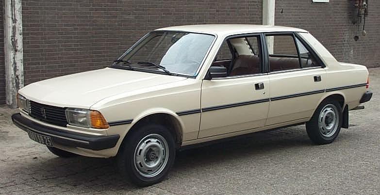 Peugeot 305 GR modèle 1982 (export)